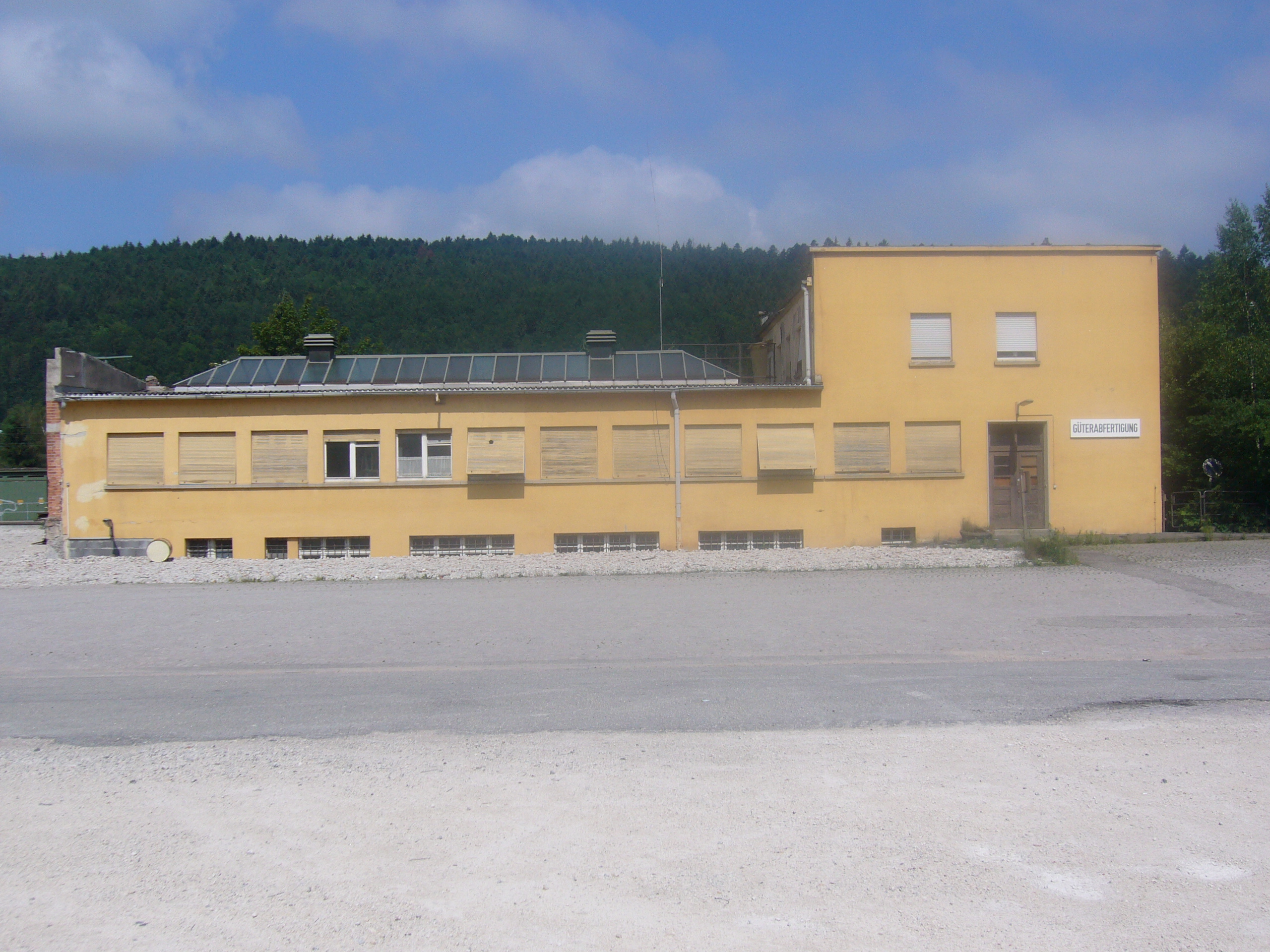 Güterabfertigung am Bahnhof Tuttlingen. Baden-Württemberg, Deutschland.